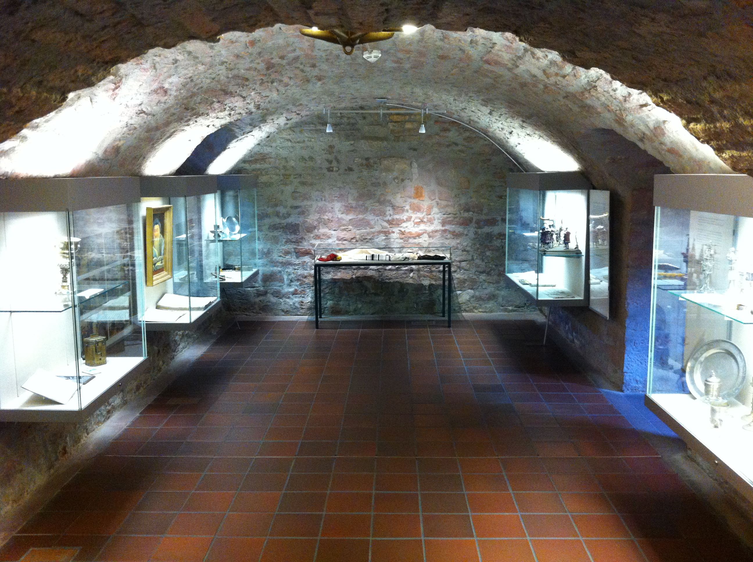 Blick in die Ausstellung des Jüdischen Museums im mittelalterliche Kellergewölbe des Raschi-Haus